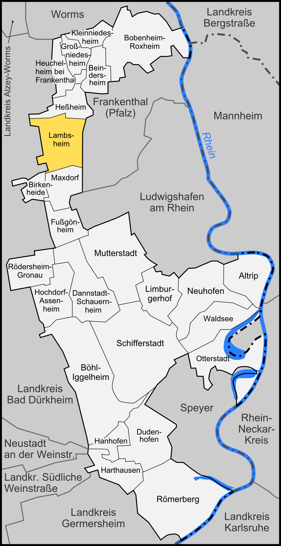 Karte der Gemeinde Lambsheim im Rhein-Pfalz-Kreis